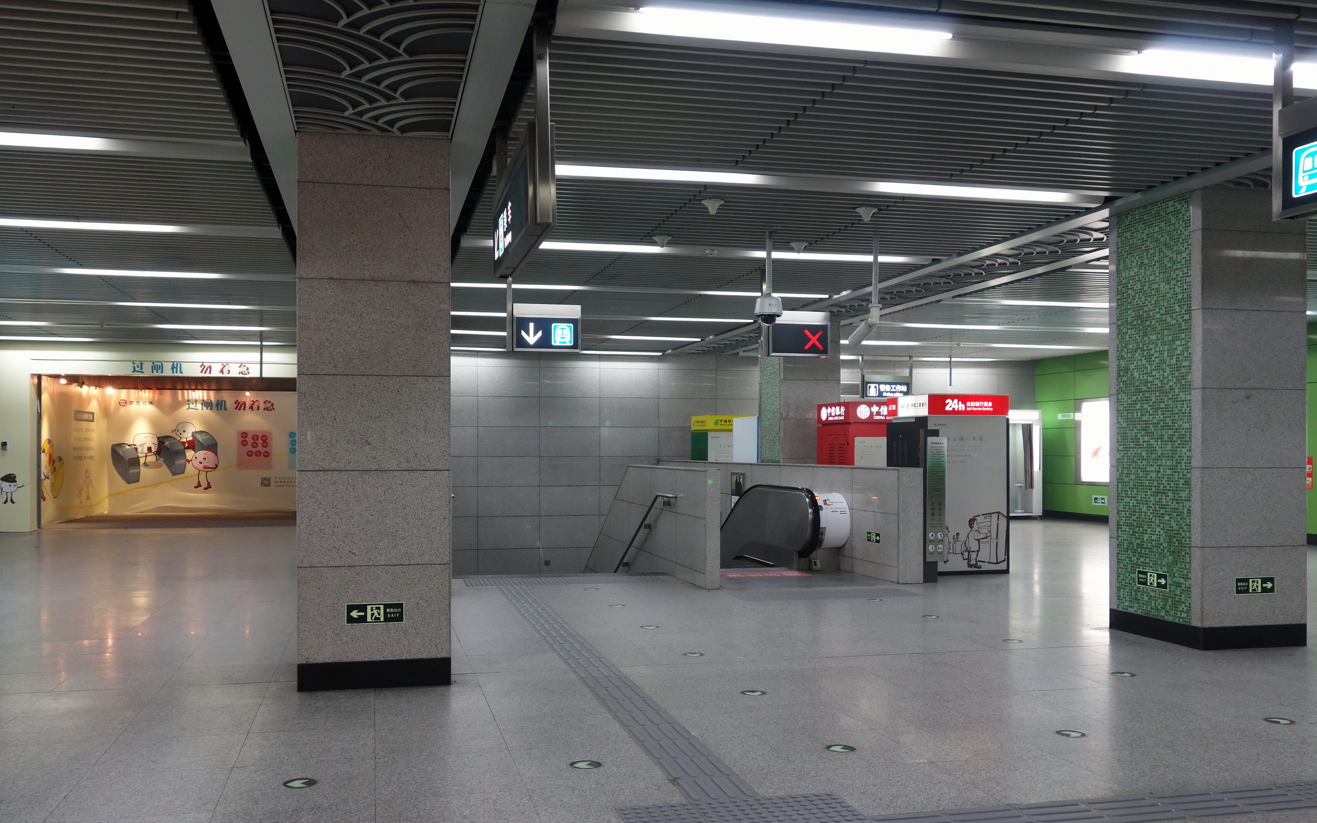 北京地铁4号线人民大学车站分离式站厅通往站台的出入口